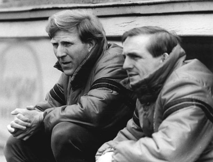 ADN-ZB-Häßler-23.4.86-zin- Dresden: Klaus Sammer (l.) ist seit der Saison 1983-84 verantwortlicher Oberligatrainer bei der SG Dynamo Dresden. Der 43jährige Diplomsportlehrer war bis 1975 aktiver Fußballer (Stahl Gröditz, SC Einheit Dresden, Dynamo Dresden) und absolvierte 17 A-Länderspiele. Von 1977 bis 1983 war er Nachwuchstrainer in Dresden. Rechts der 38jährige Trainer Dieter Riedel.